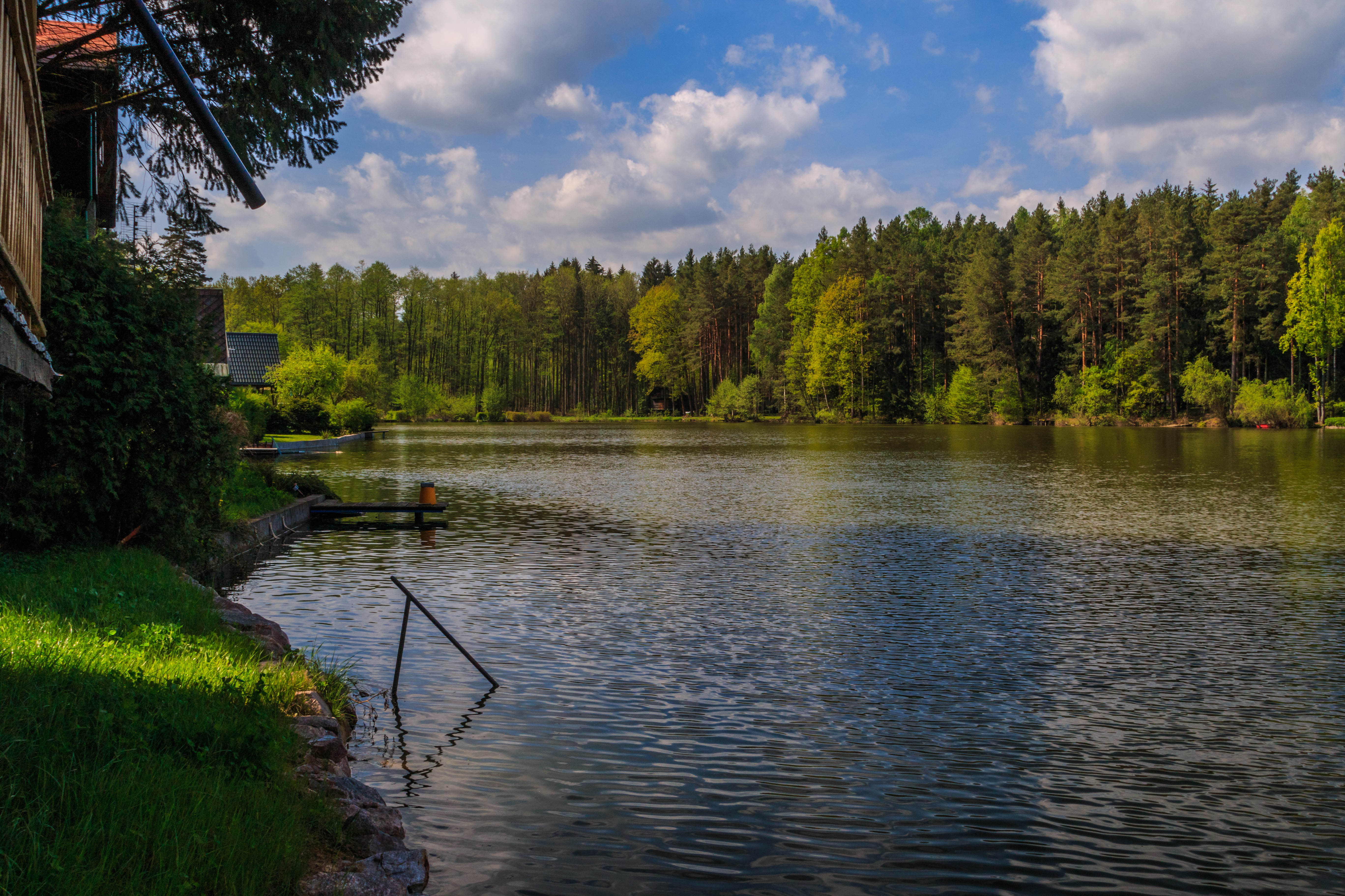 Rybník Černovka u Rašov Project: Vodstvo.